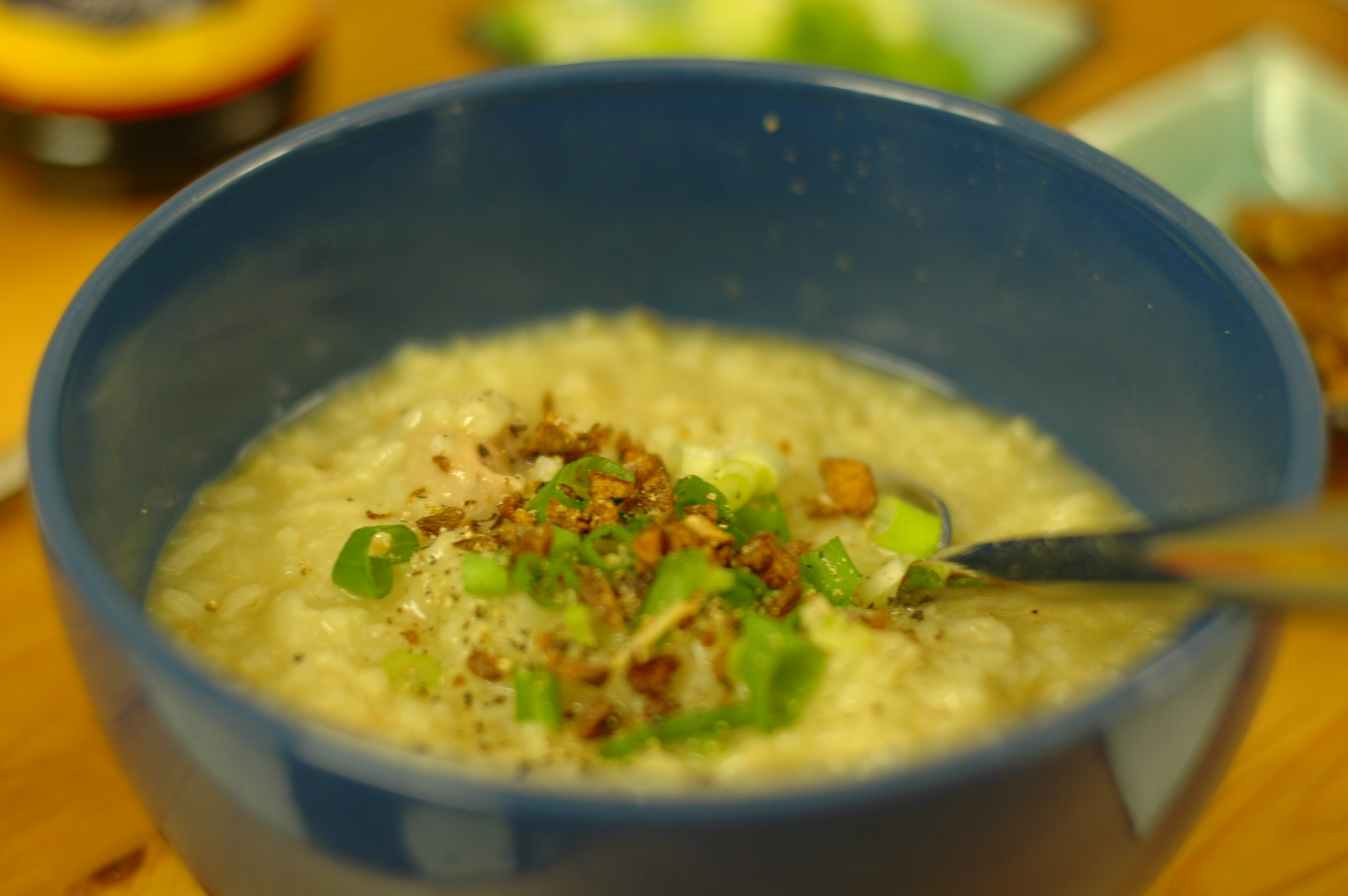 Mmmm, mmm... Mom's arroz caldo.